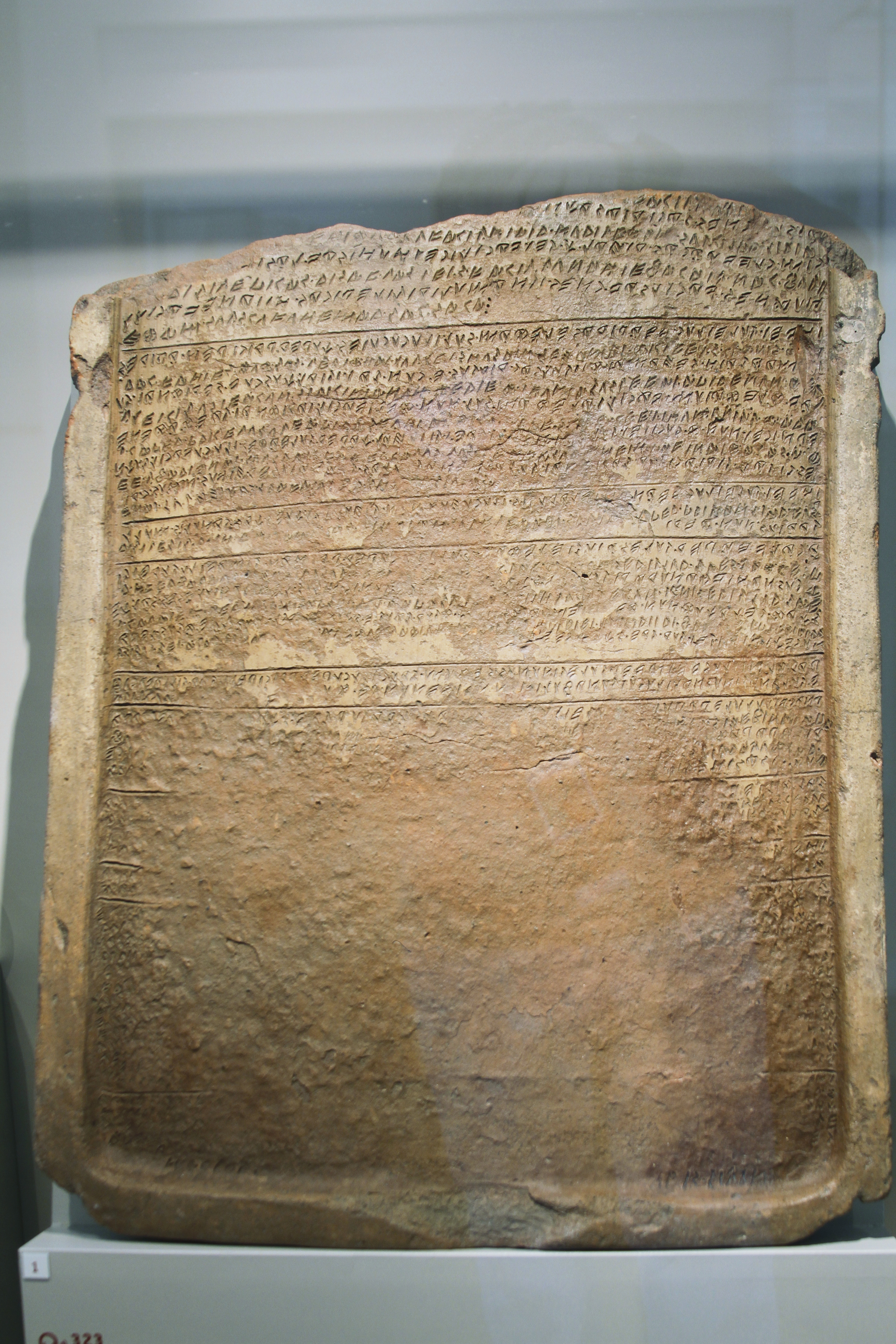 Altes Museum - Berlin - Germany